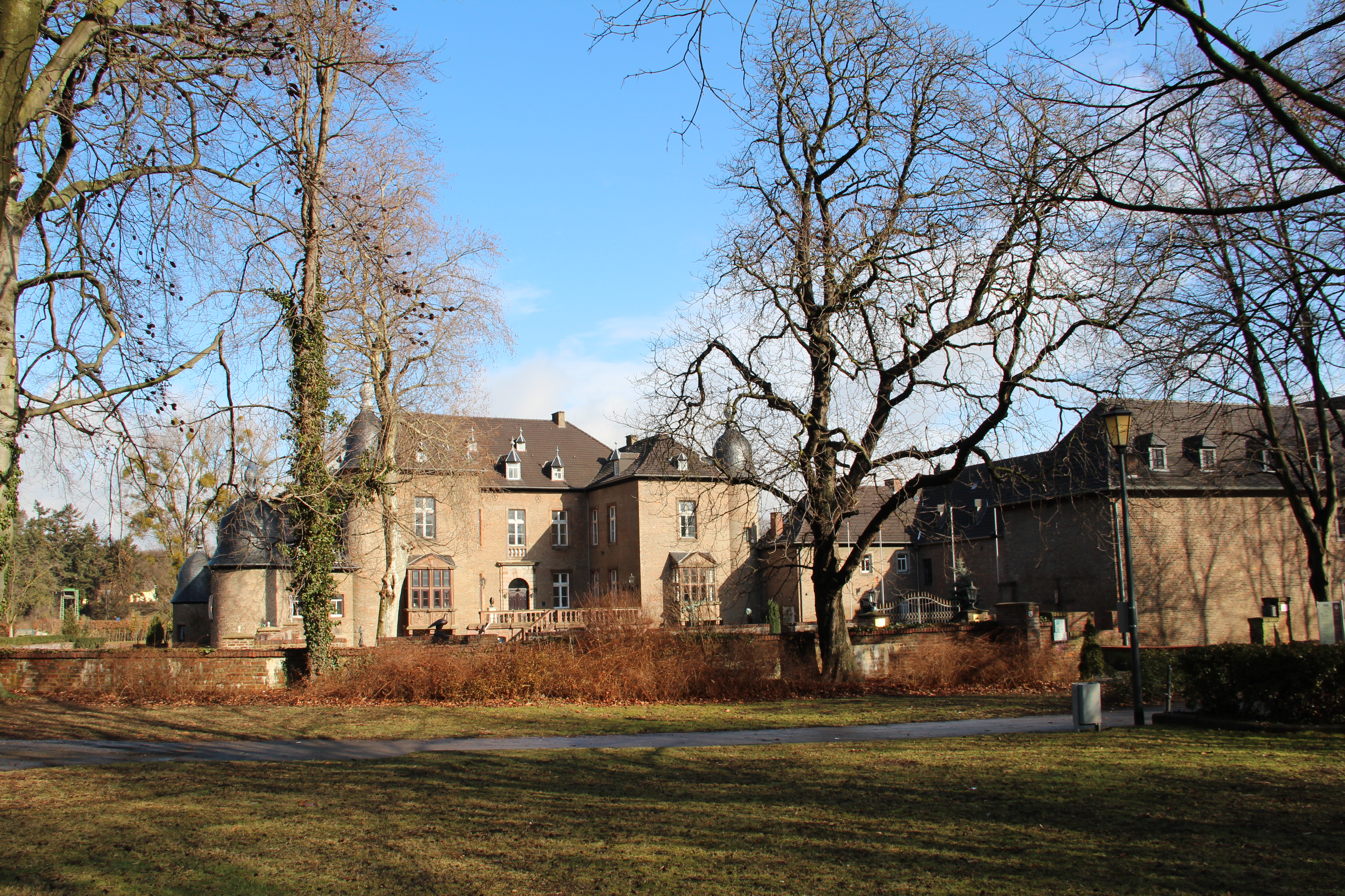 Schloss Nörvenich, Kreis Düren, Nordrhein-Westfalen (19. Februar 2012)